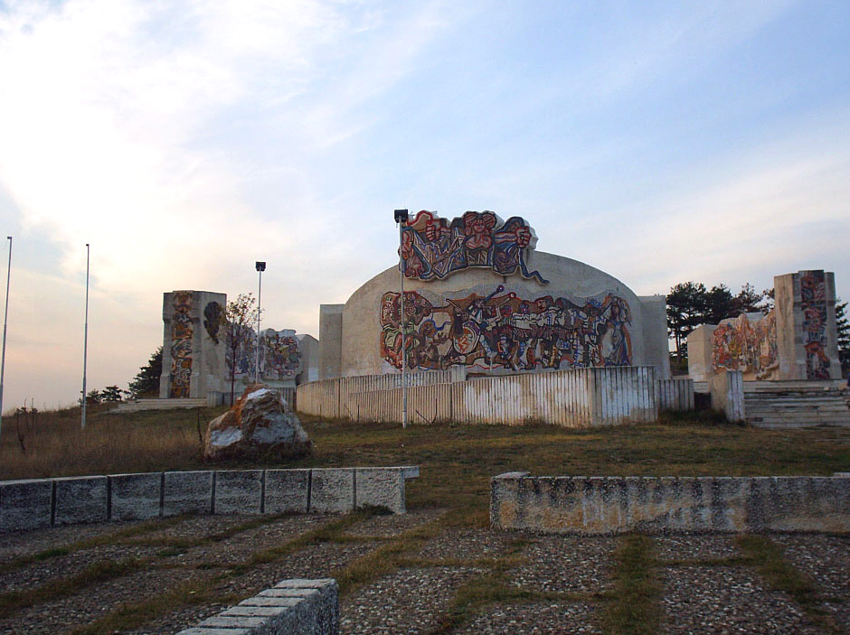 Freedom Monument in Kočani, R.o.Macedonia Pomnik Wolności w Kočani, Macedonia Споменик на Слободата во Кочани, Македонија